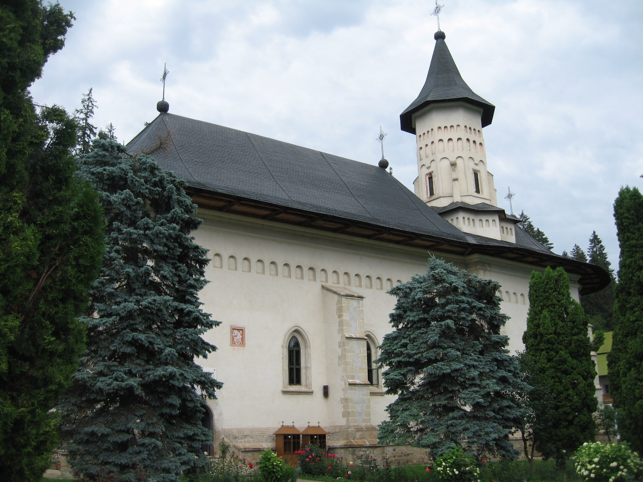 Mănăstirea Slatina